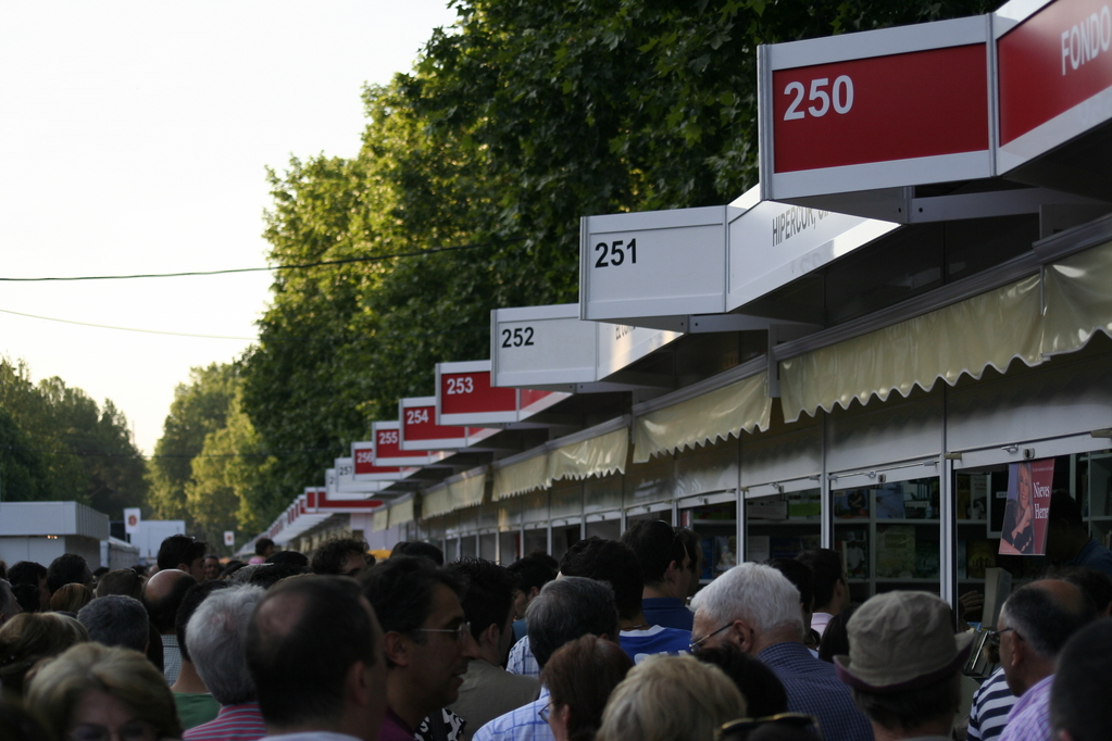 Feria del Libro de Madrid 2006, en el Retiro